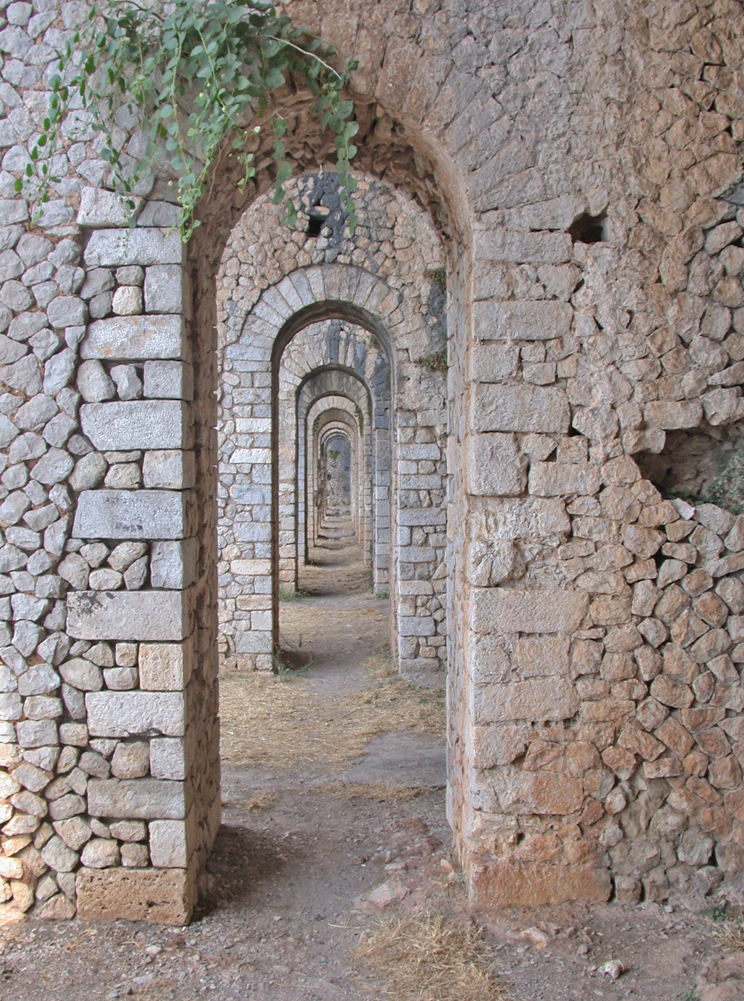 Terracina (provincia di Latina, Lazio, Italia), tempio di Giove Anxur, corridoio esterno della terrazza su cui sorgeva il tempio.